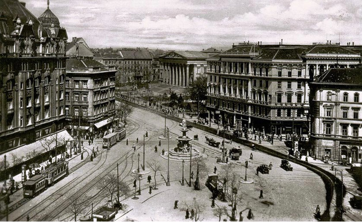 Budapest. A neoreneszánsz Danubius-kút (tervező Ybl Miklós, szobrász Feszler Leó) még eredeti helyén, a Kálvin téren 1896-ban. Allegorikus alakjai az ország négy folyamát ábrázolják; a központi szobor Danubius férfialakja, lábával egy delfinen áll, kezeiben lapát és kagyló. Alatta a Tisza nőalakja, hálójában kecsegek. A mosolygós Dráva, lábát egy korsóra helyezi, a keresztbe tett lábú alak a Száva. Az 1869-ben épült Pesti Hazai Első Takarékpénztár épülete (jobbra). Forrás